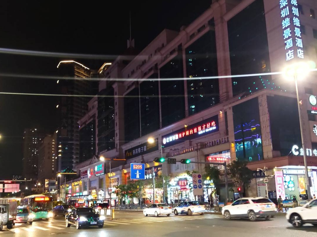 the start point in Shenzhen City of G205